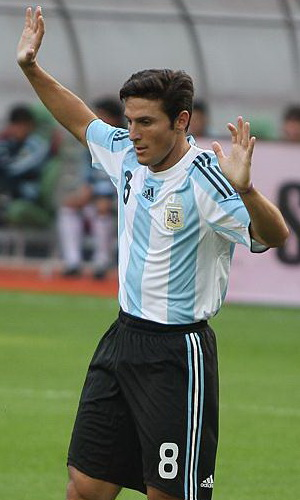 Javier Zanetti